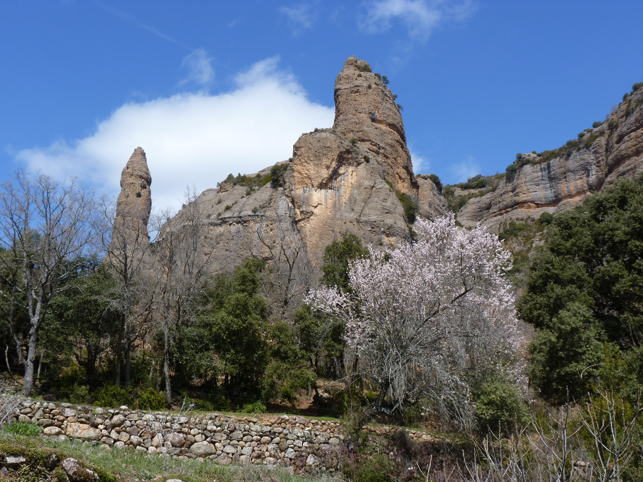 Picorres de Serradell